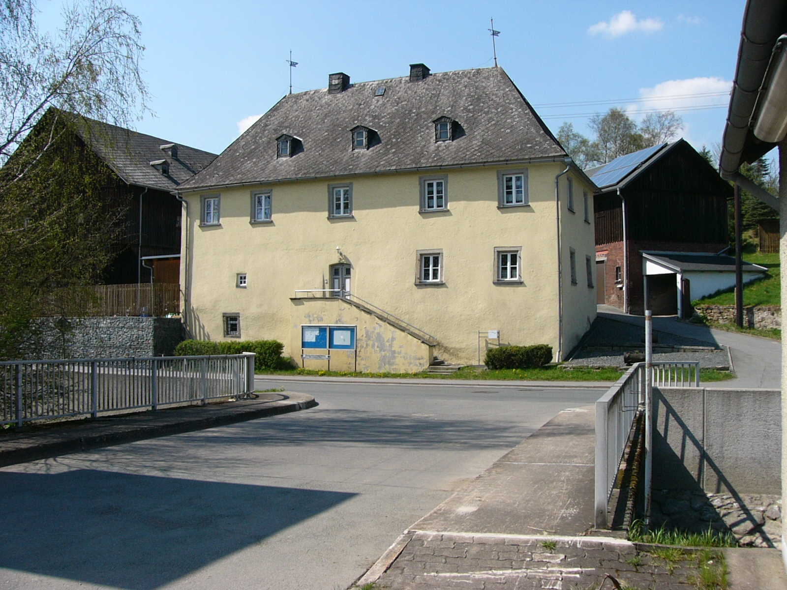 Ansicht von Fattigau, Standort des Schlosses